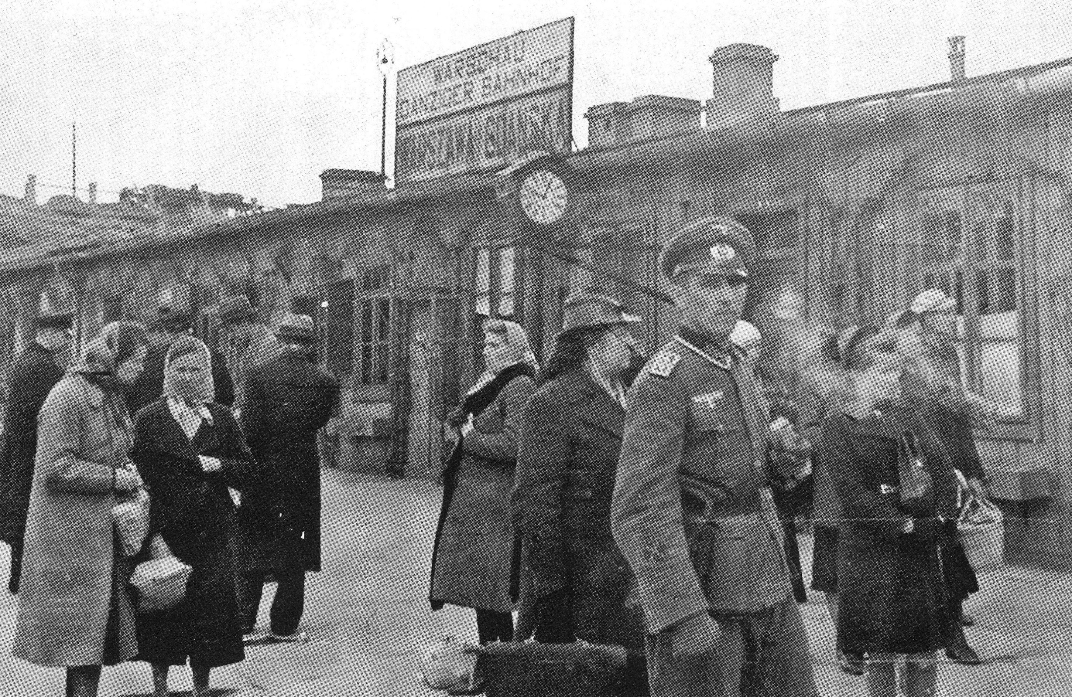 Dworzec Gdański w Warszawie